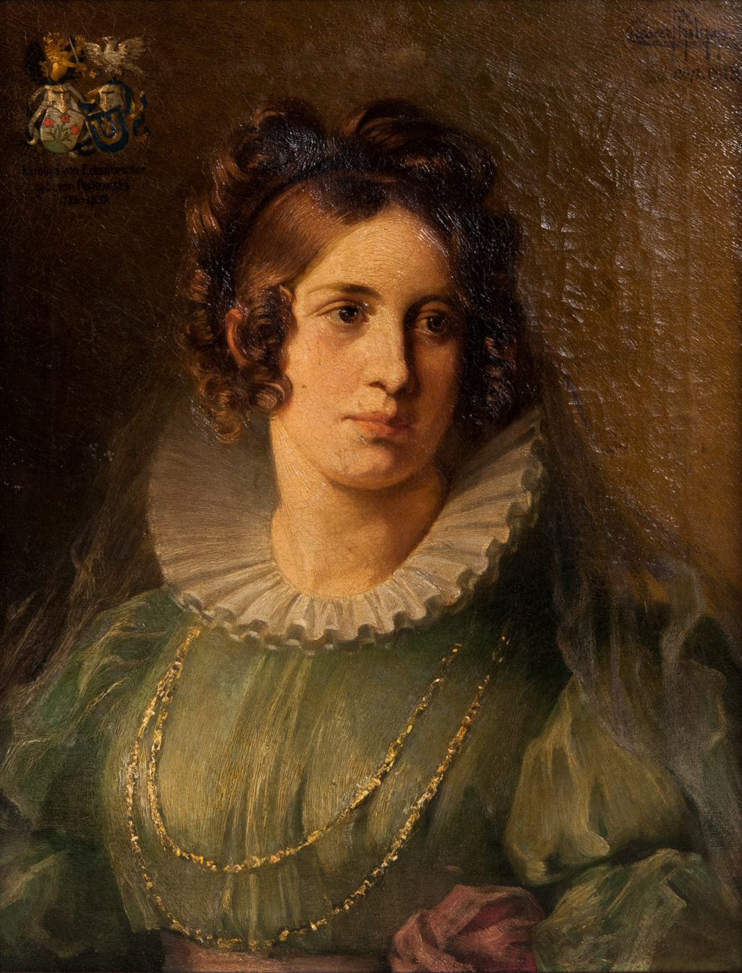 Karoline von Eckenbrecher (* 19. Mai 1786; † 8. Juli 1832), geb. von Pelkowski , Öl auf Leinwand, Kopie eines älteren Portraits